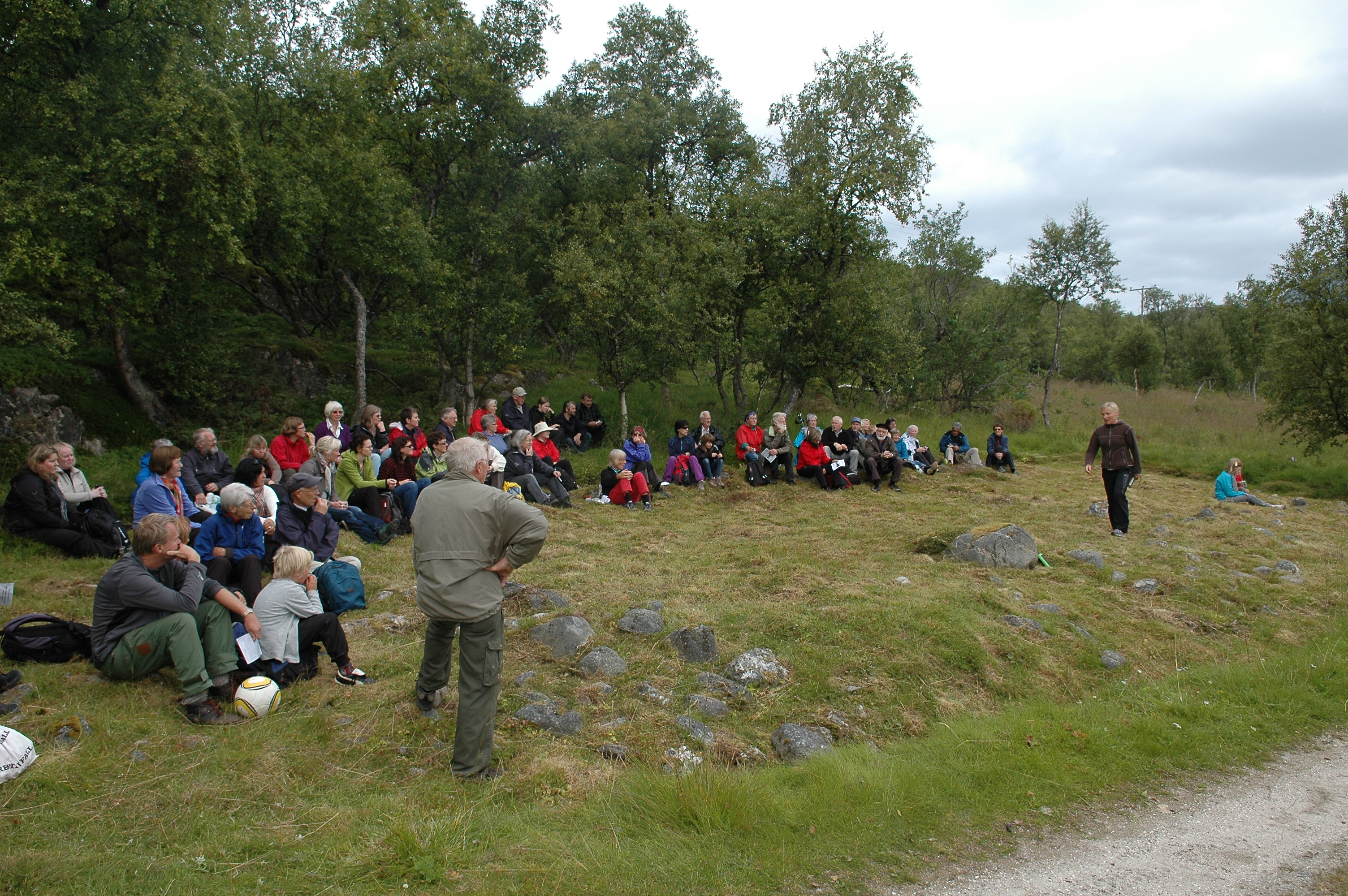 Omvisning på Kulturminnedagen august 2010